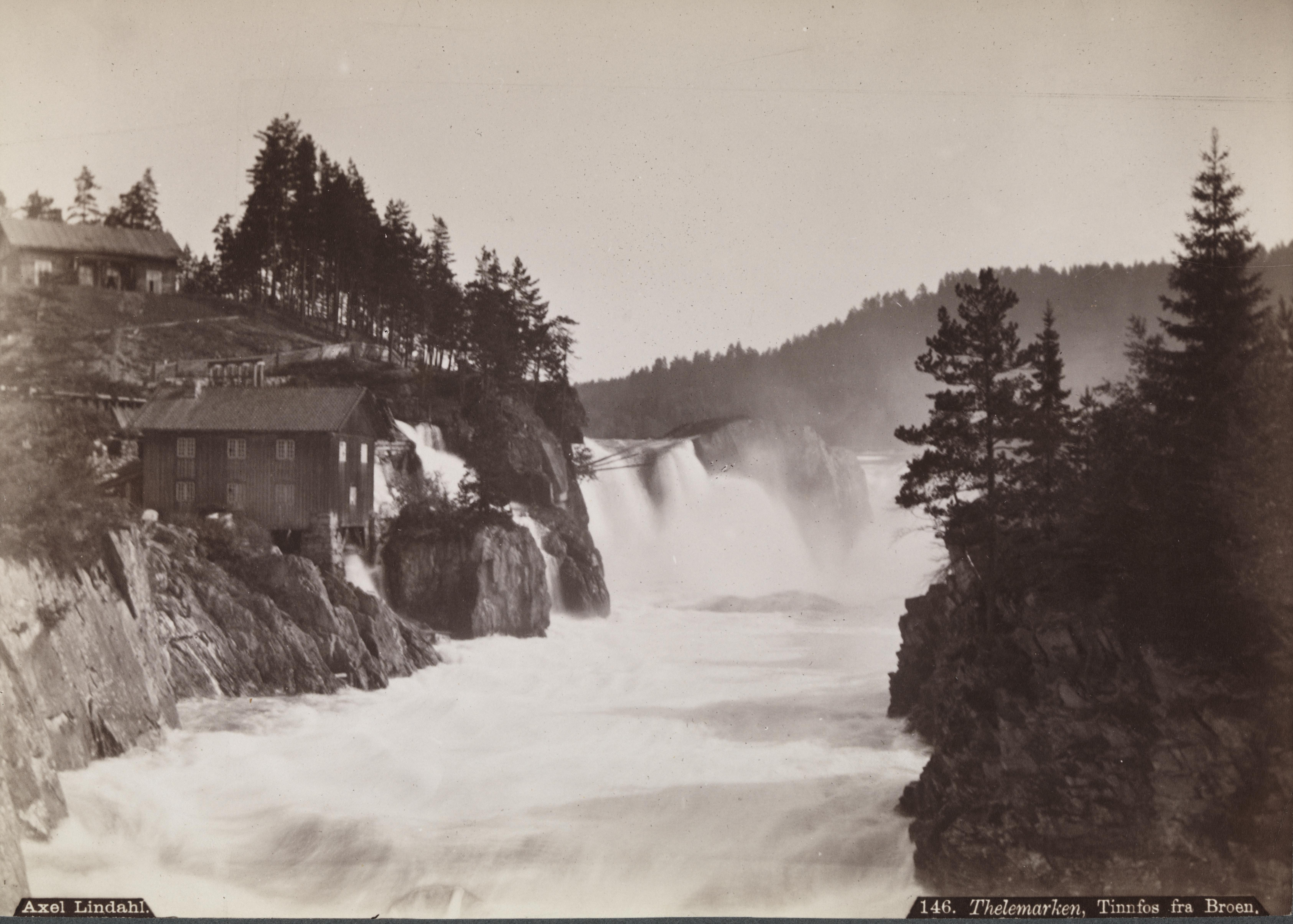 Thelemarken, Tinnfoss fra Broen Sted: Tinnfoss Kommune: Notodden Fylke: Telemark Tagger: fosser landskapsfotografi